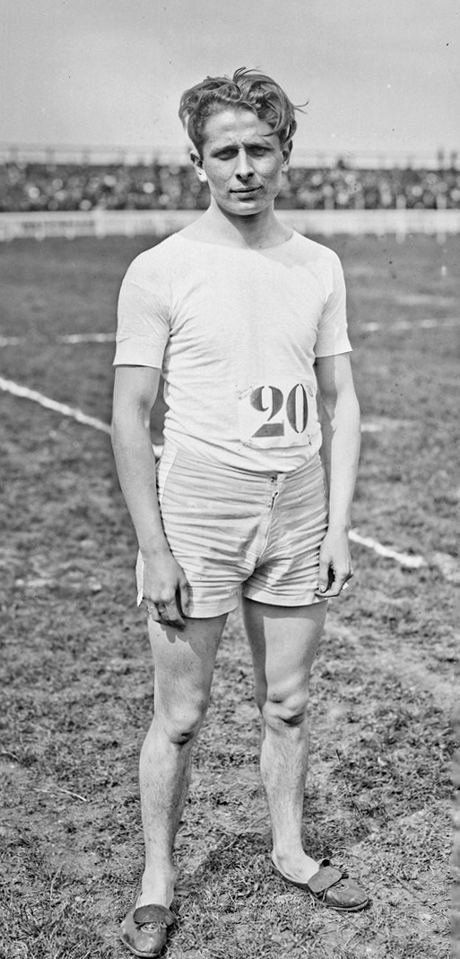 Lorain [du CASG, vainqueur du 60 m du challenge Dezaux, stade de Colombes, le 30 avril 1922]